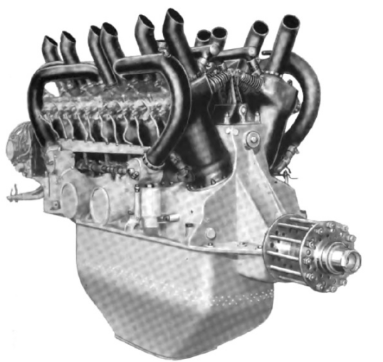 Lancia V-12 motore aeronautico con cil. individuali e unica valvola